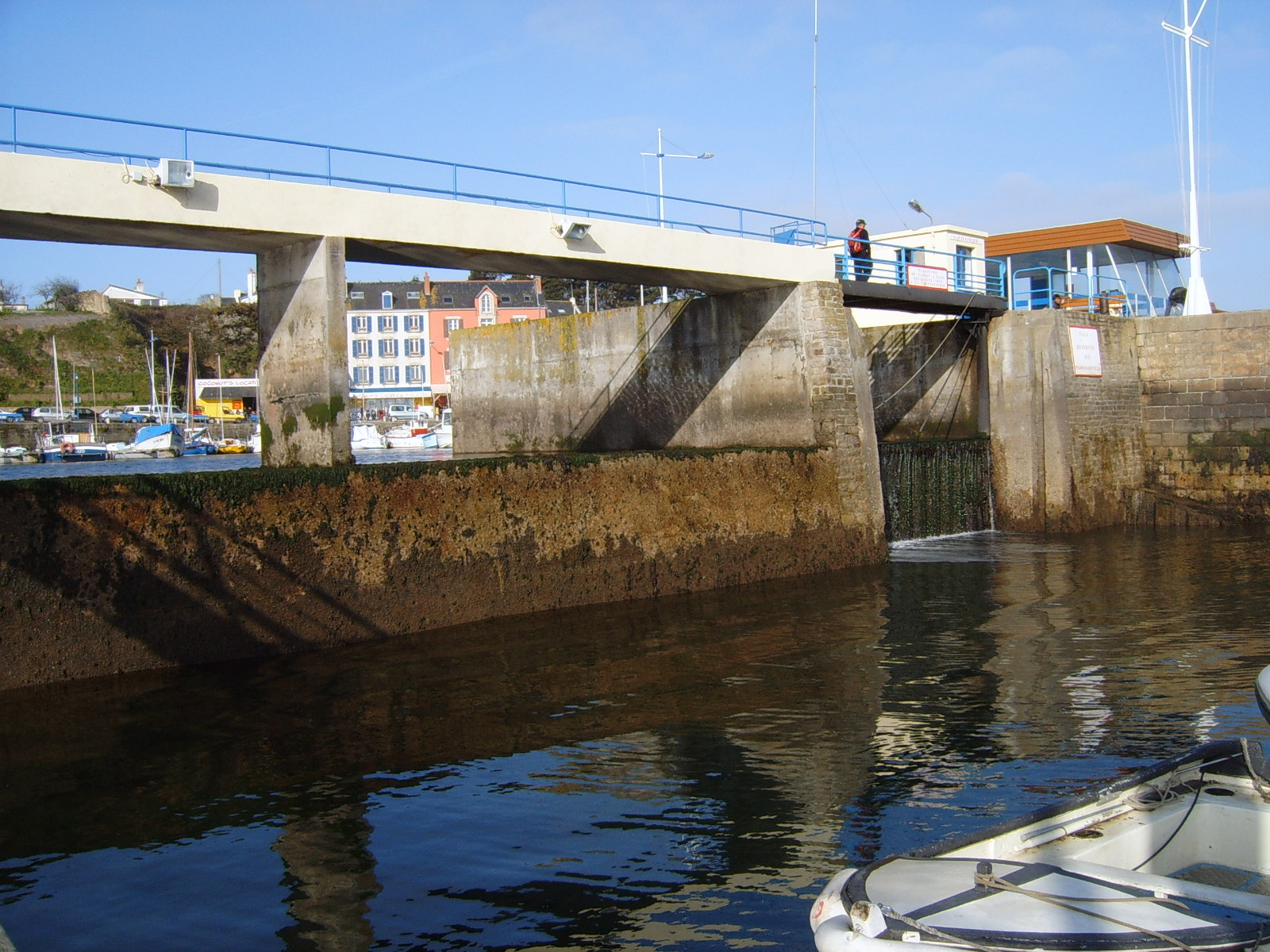 écluse simple à Porte Tudy (entre les deux darses) sur l'île de Groix. Personal picture, I set it in public domain.